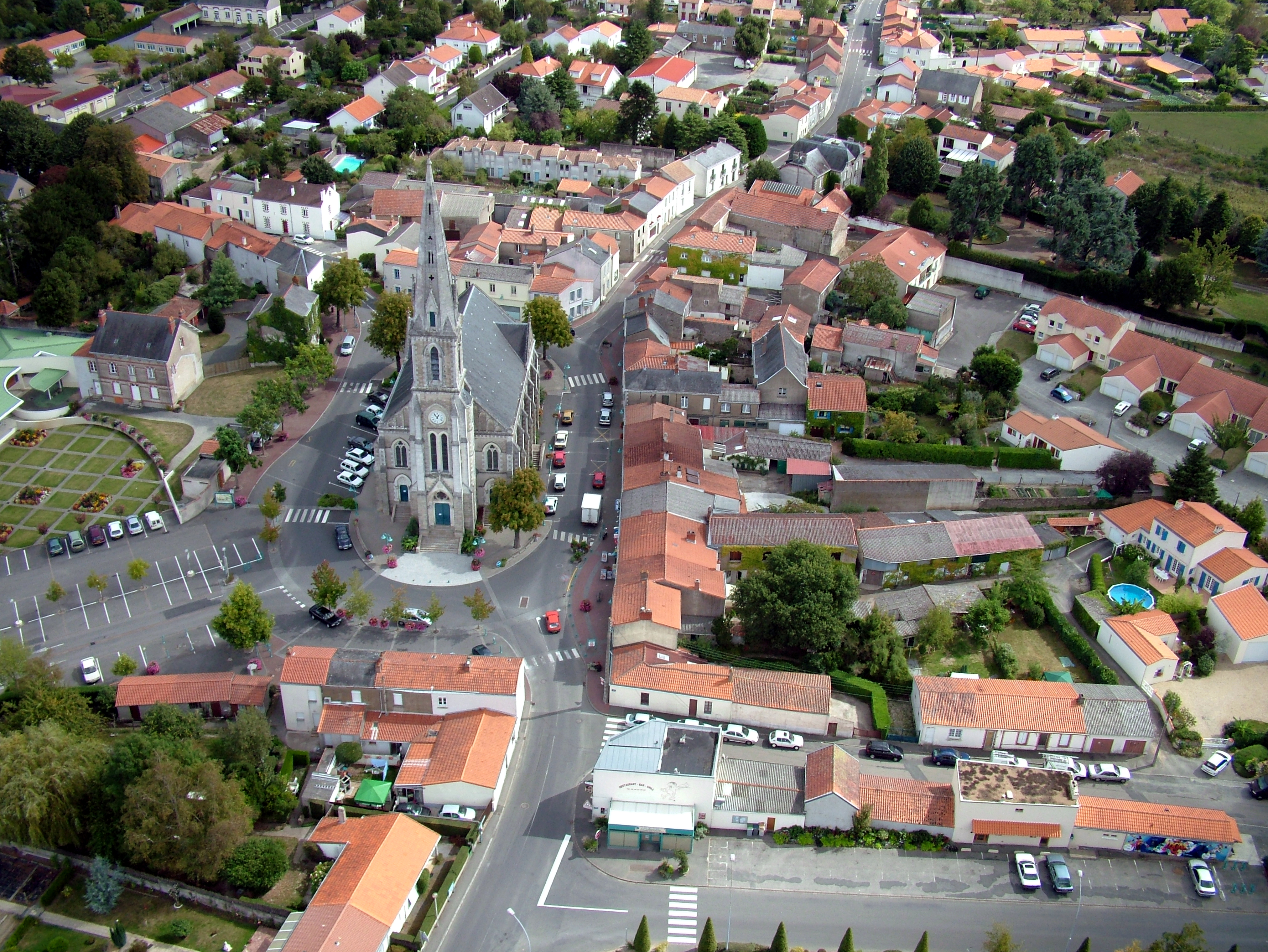 Place de l'église, prise de vue à partir d'un ballon captif